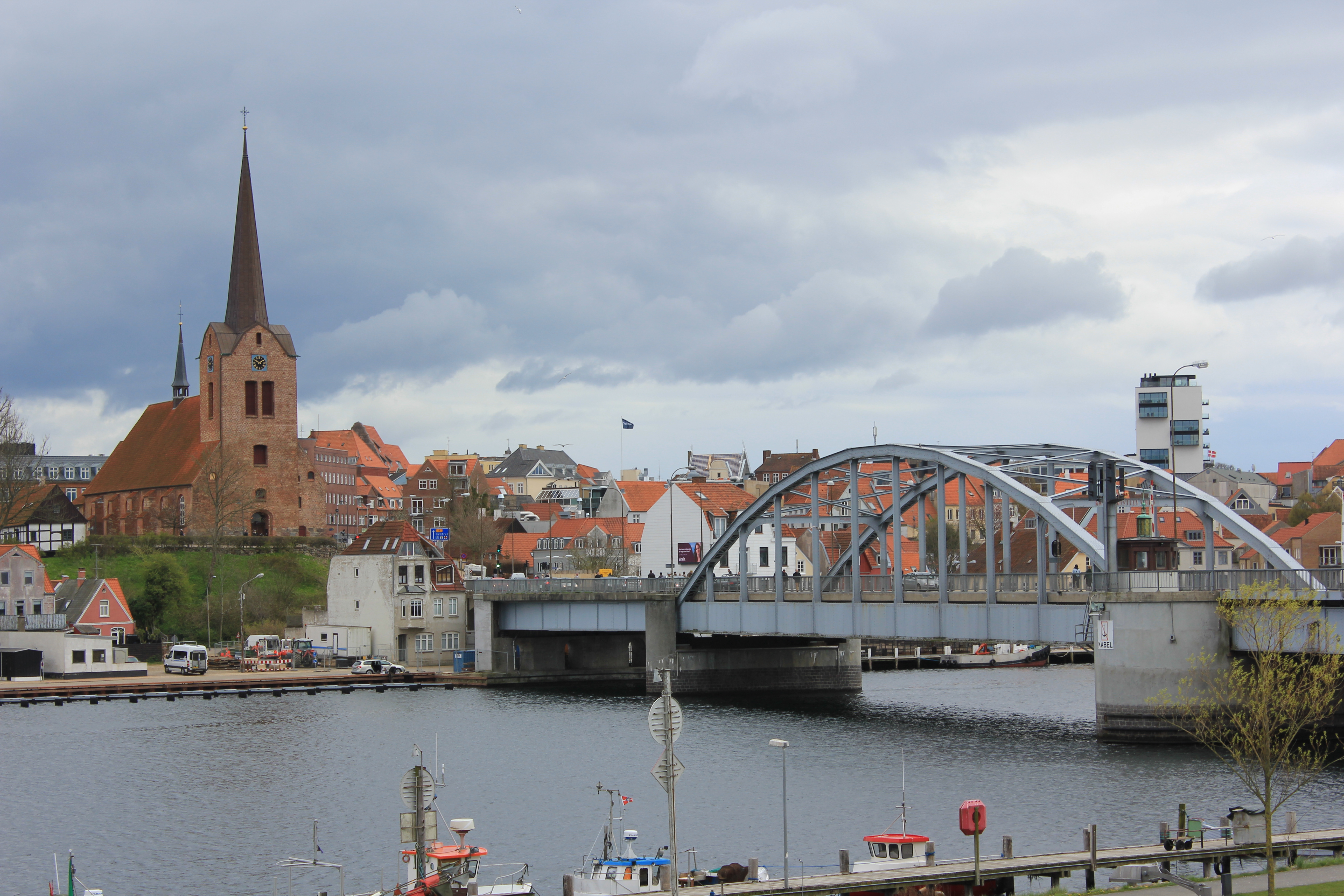 König Christian X.-Brücke und St. Marie Kirche am 18. April 2014, Bild 03